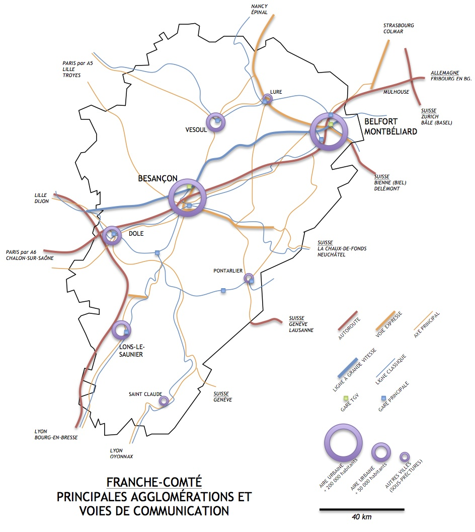 FRANCHE COMTE TRANSPORT